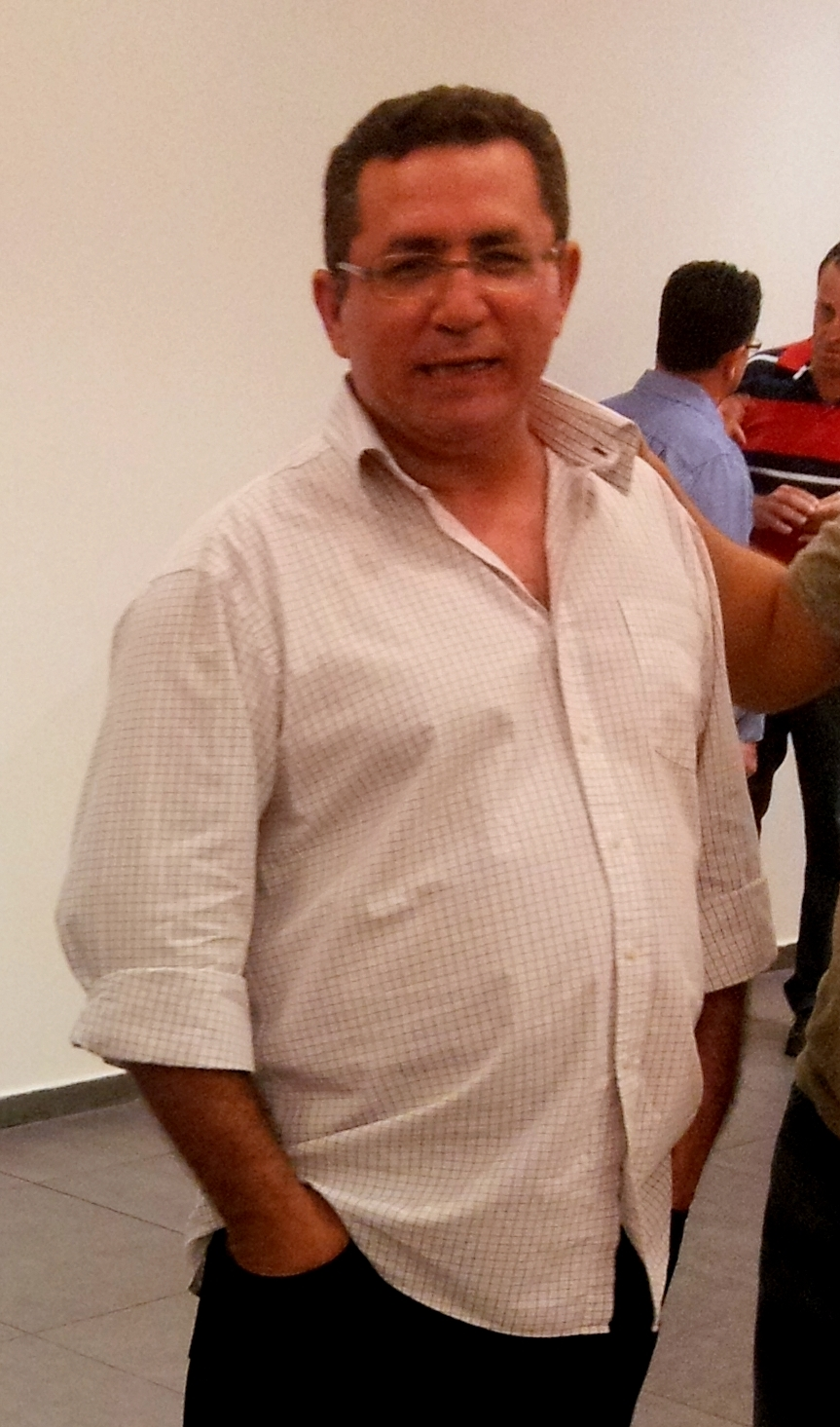 עופר עיני, בועידת מפלגת העבודה